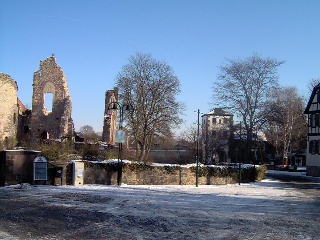 Ansicht der Burg aus der Altstadt heraus. Links Ruine Palas, rechts Untertor